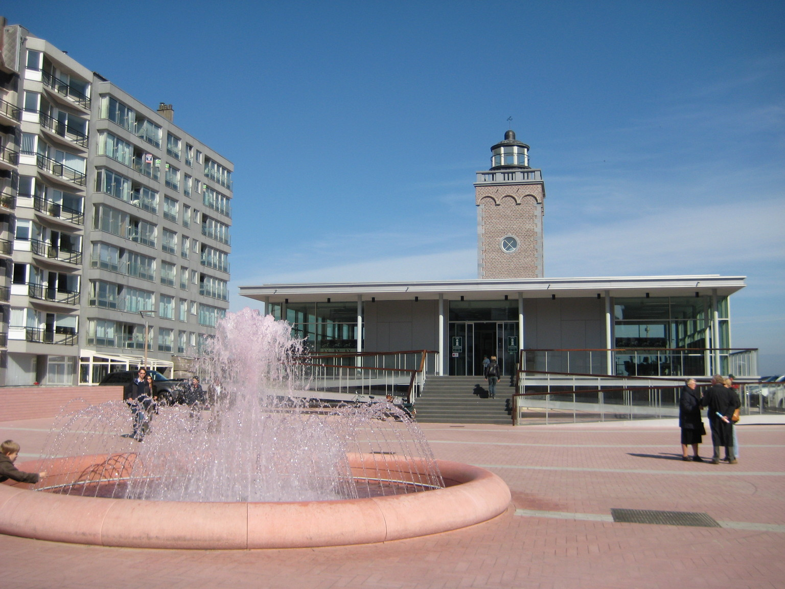 Knokkeplage